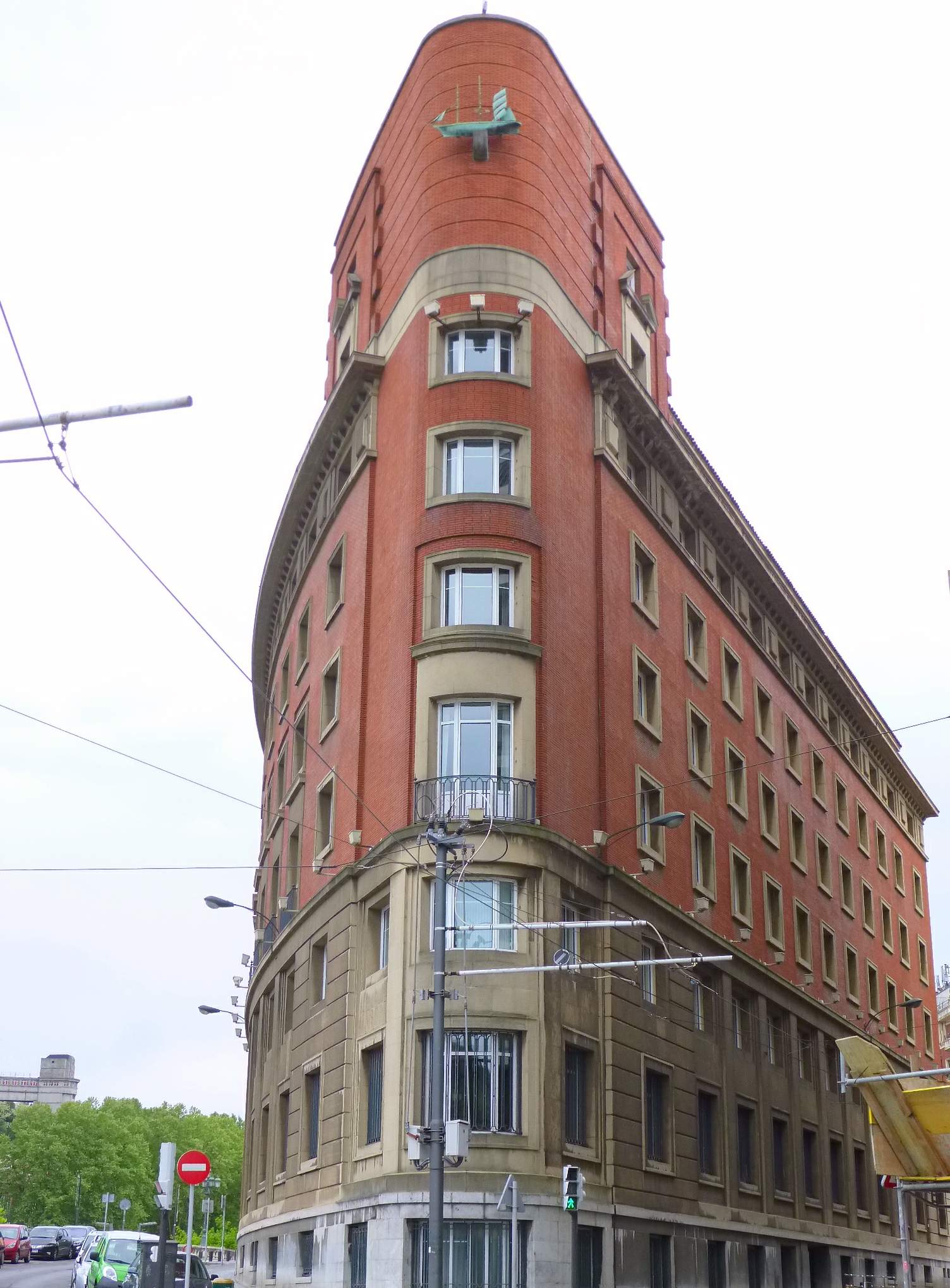 Edificio de la Naviera Aznar (Bilbao)